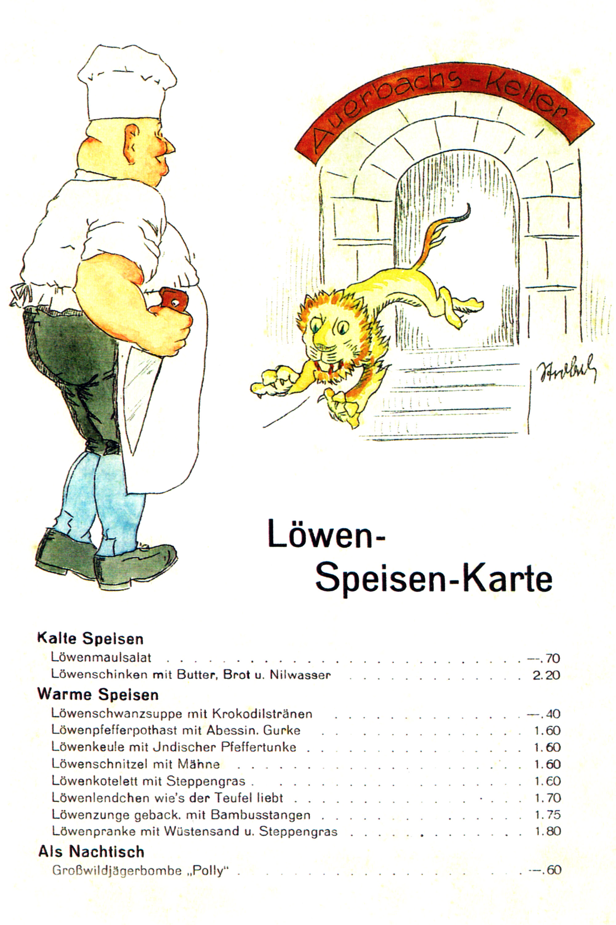 Auerbachs Keller wartete nach den ereignissen der Leipziger Löwenjagd am 19. Oktober 1913 mit einer Löwen-Speisen-Karte auf. Die Namen der Gerichte entsprangen der Phantasie und dienten allein dem Marketing des Hauses. Löwenfleisch wurde in der Küche nicht verarbeitet.